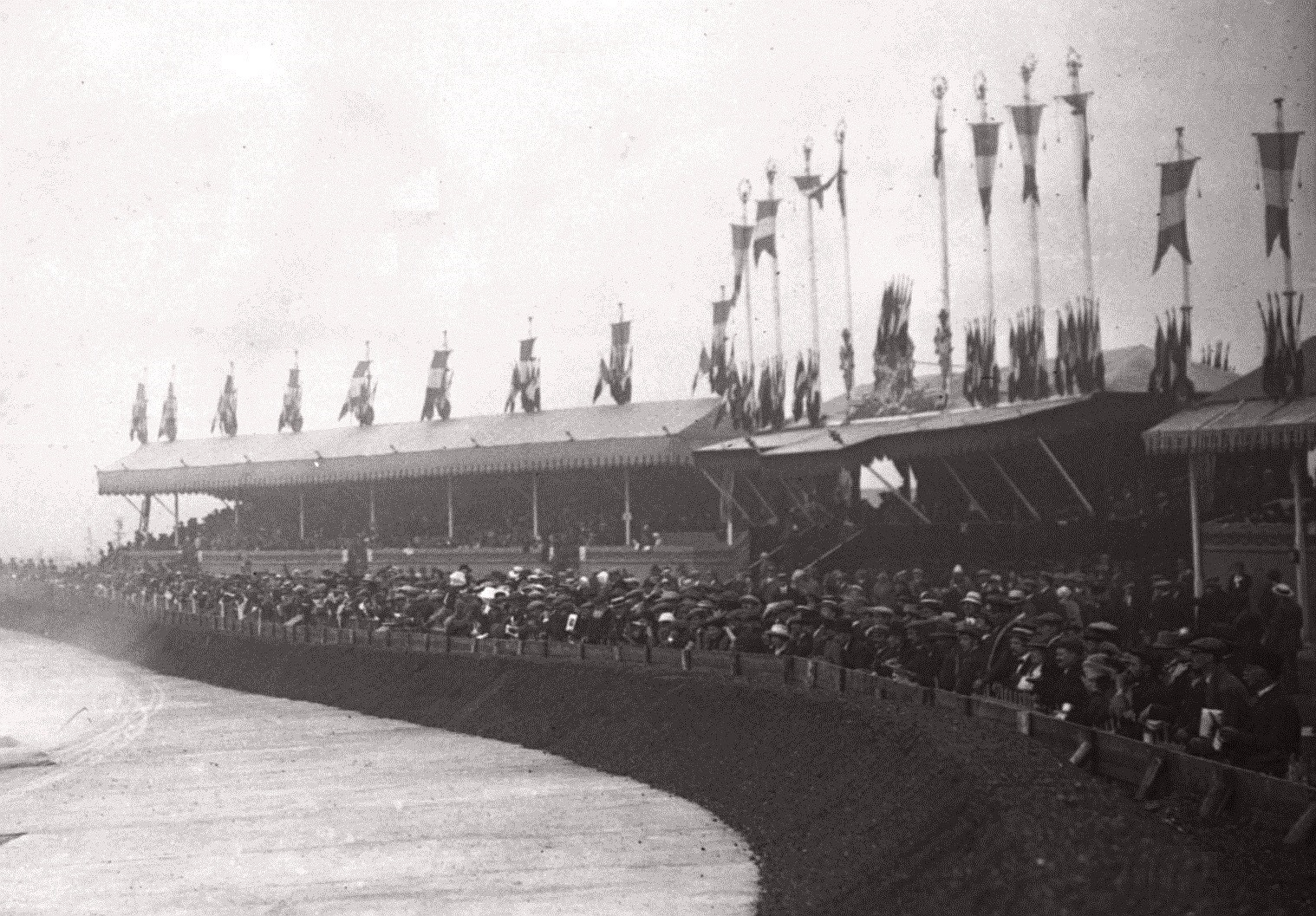 Tribune principale du Grand Prix de France 1913 à Amiens.